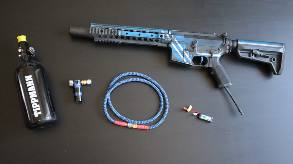 HPA setup featuring a 0,8 litre 300 PSI airtank, Wolverine Storm Regulator and a rifle.